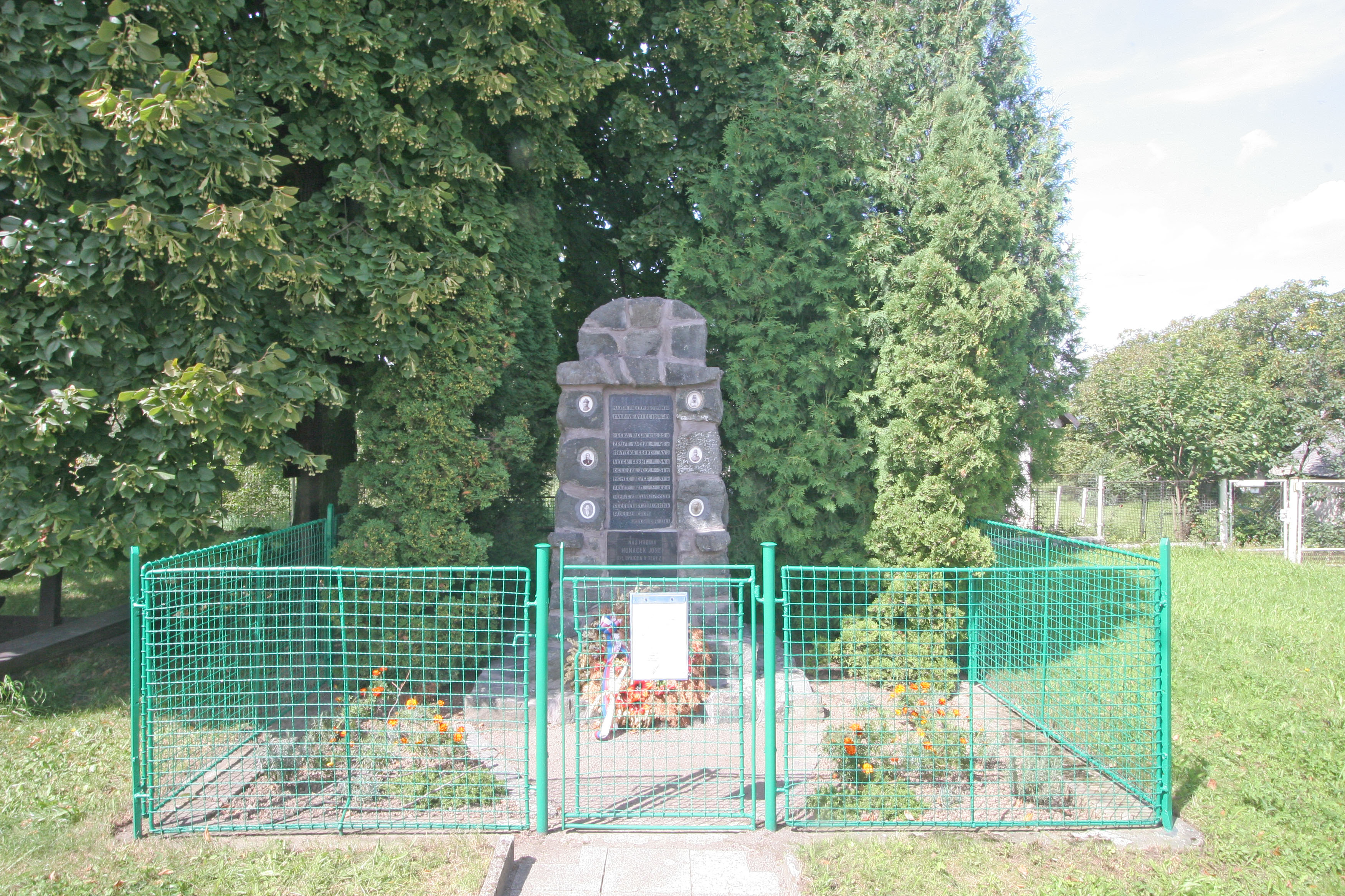 Hošťalovice pomník padlých